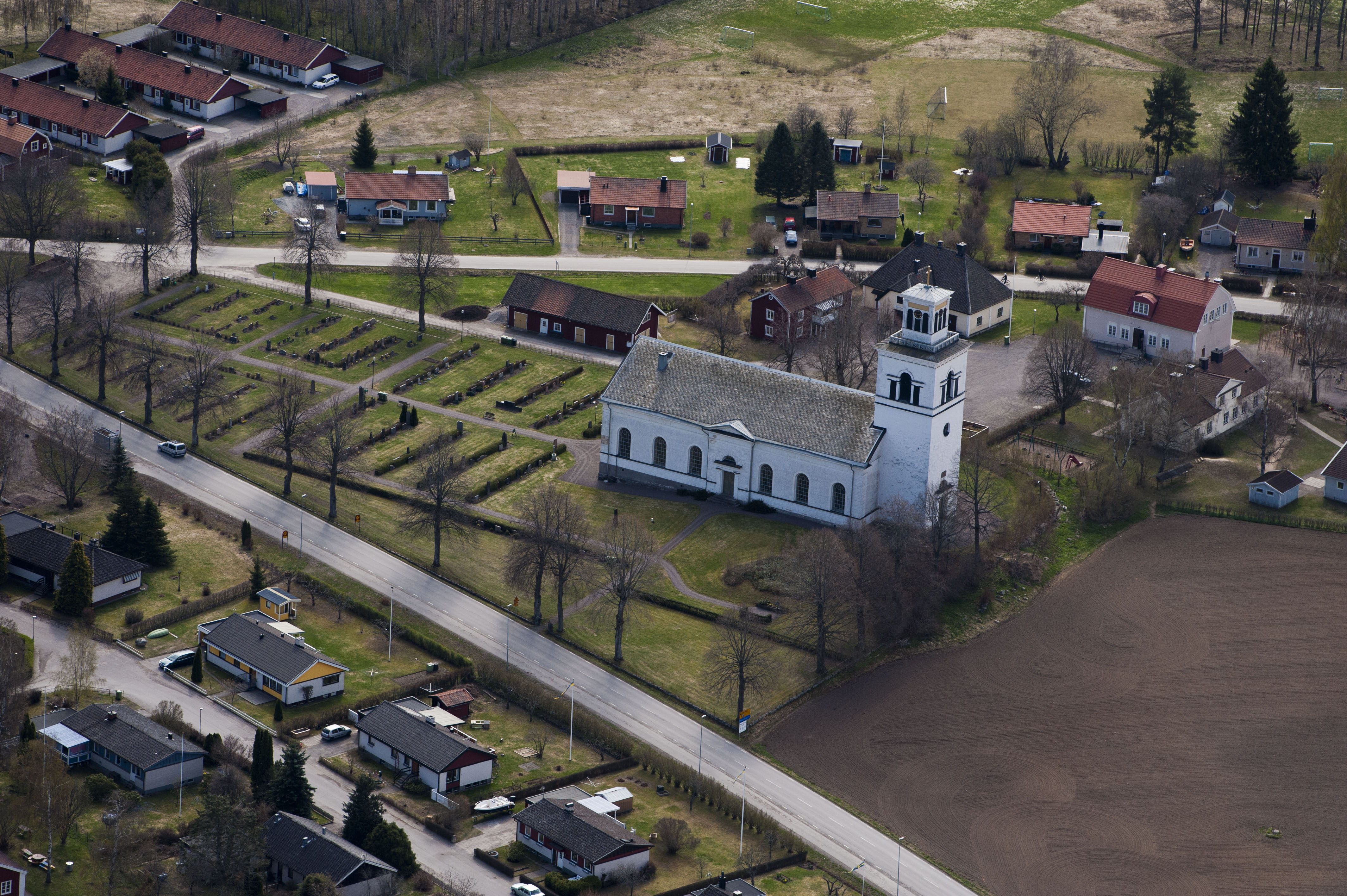 Mogata ka